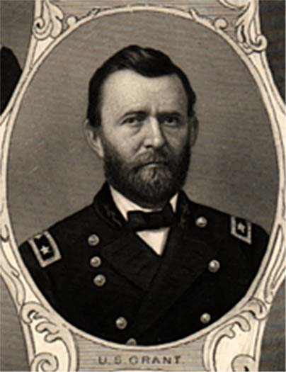 General Ulysse Grant